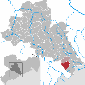 Sayda in Saxony - district Mittelsachsen